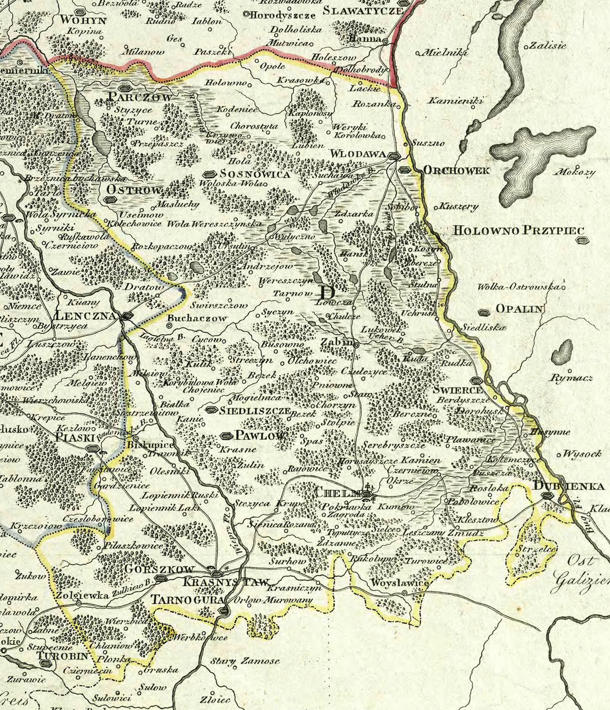 Cyrkuł (okręg chełmski) na mapie Galicji Zachodniej, 1803 r.